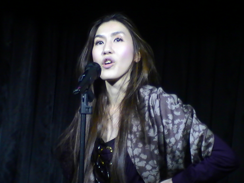 薄幸 (お笑い 2016年3月29日)